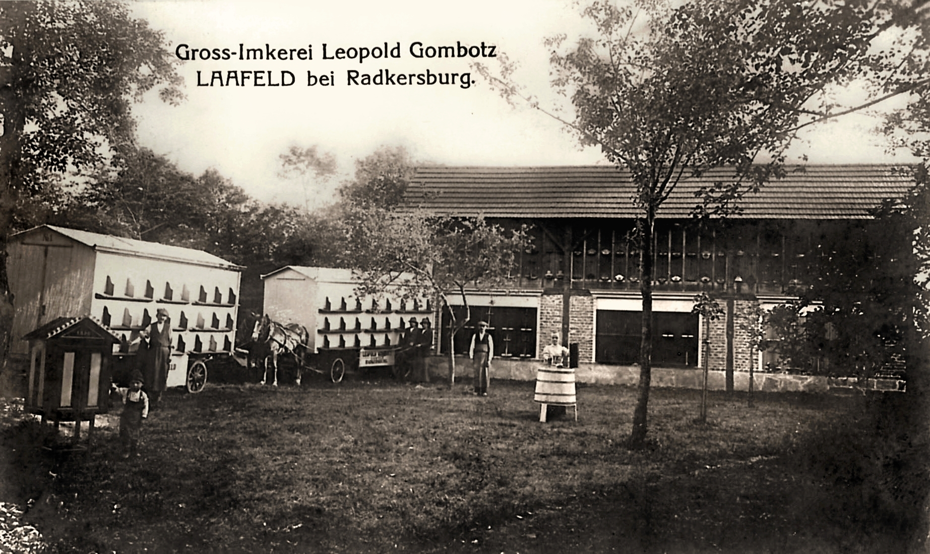 Werbepostkarte der Großimkerei des österreichisch-ungarischen Imkers Leopold Gombocz (1875–1943) aus dem Jahr 1909. Das Foto zeigt eine Teilansicht des Hofes/Imkereibetriebes von Gombocz in Laafeld bei Radkersburg (Steiermark; heutige Adresse: Laafeld 76–77, Bad Radkersburg), und zwar von links nach rechts: • eine sogenannte Bienenstockwaage mit zwei Waaagstöcken; • die beiden ersten von Gombocz entwickelten und angefertigten, speziellen Bienenwagen für jeweils 54 Bienenvölker, davon ein Wagen mit Pferdegespann; • das Bienenhaus mit Platz für insgesamt 170 Bienenvölker; mit teils geöffneten, teils verschlossenen Bienenstöcken; • und eine Honigschleuder. Außerdem sind folgende Personen zu sehen: vor dem linken Bienenwagen Leopold Gombocz, vor ihm sein Sohn Leopold und in Bildmitte hinter der Honigschleuder Gombocz' Ehefrau Theresia Gombocz, sowie dazwischen zwei unbekannte Fuhrleute und ein weiterer, unbekannter Mitarbeiter.